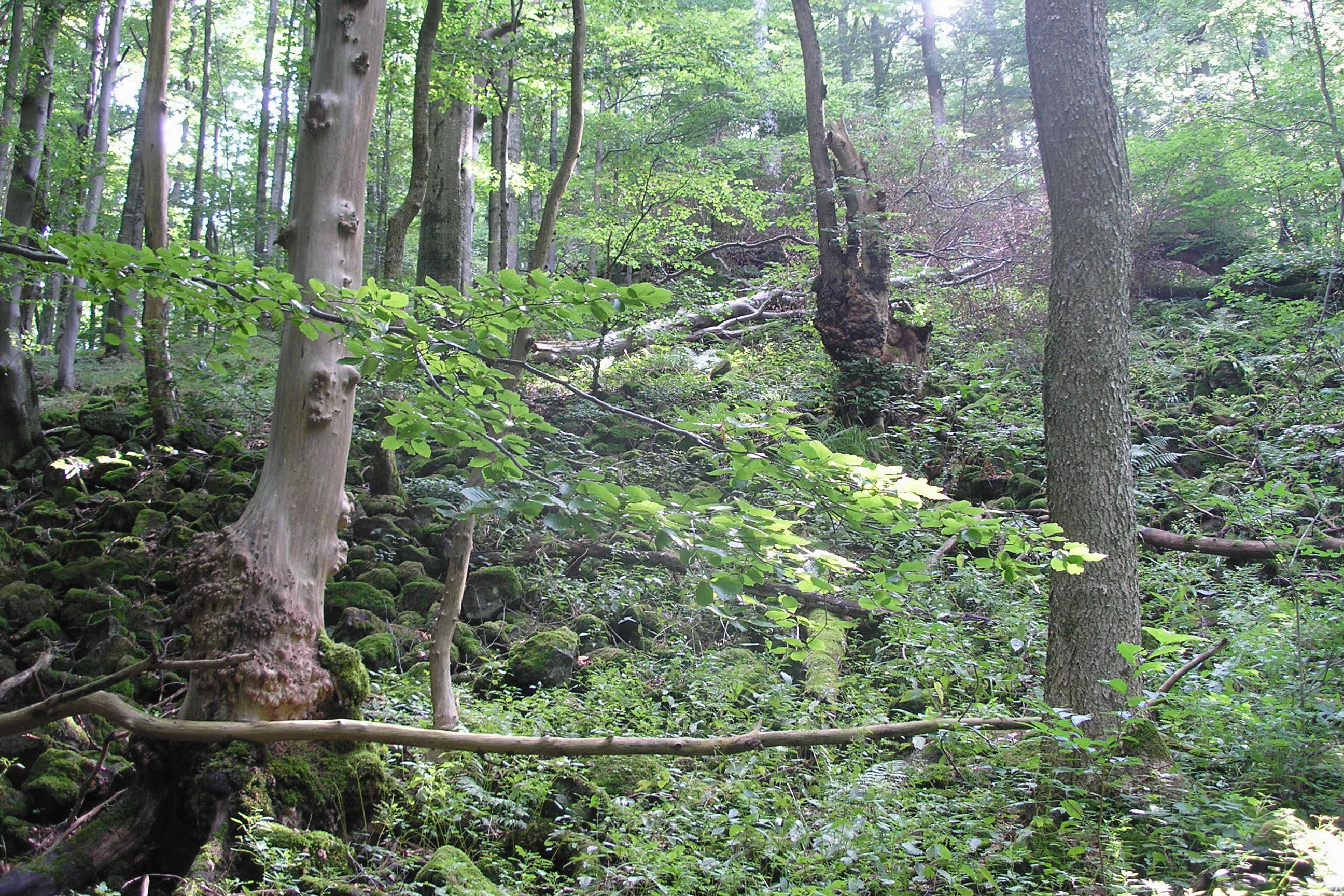 Naturschutzgebiet Schwarze Berge, Naturwaldreservat Lösershag